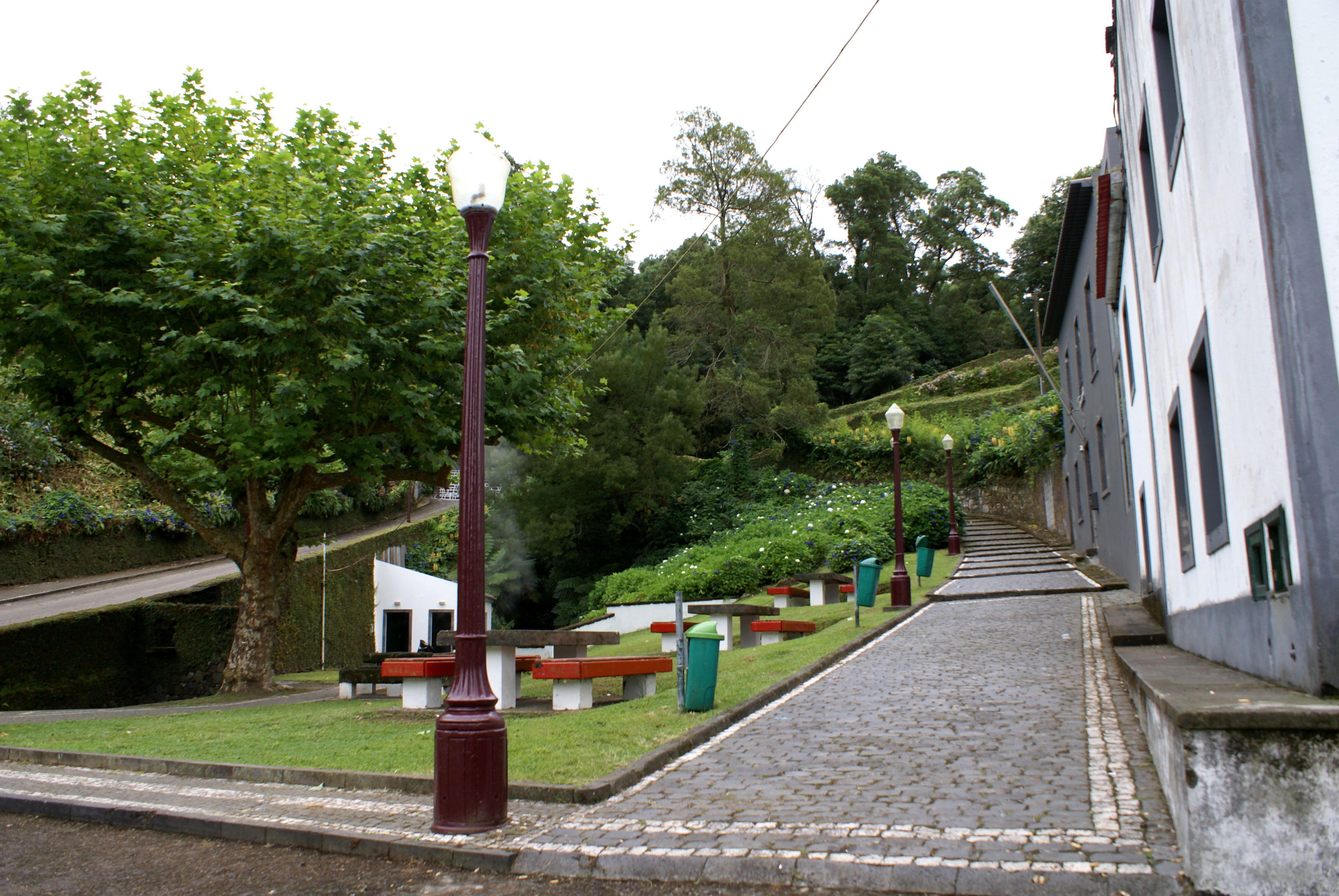 Termas da Ribeira Grande, parte do conjunto termal, ilha de São Miguel, Açores